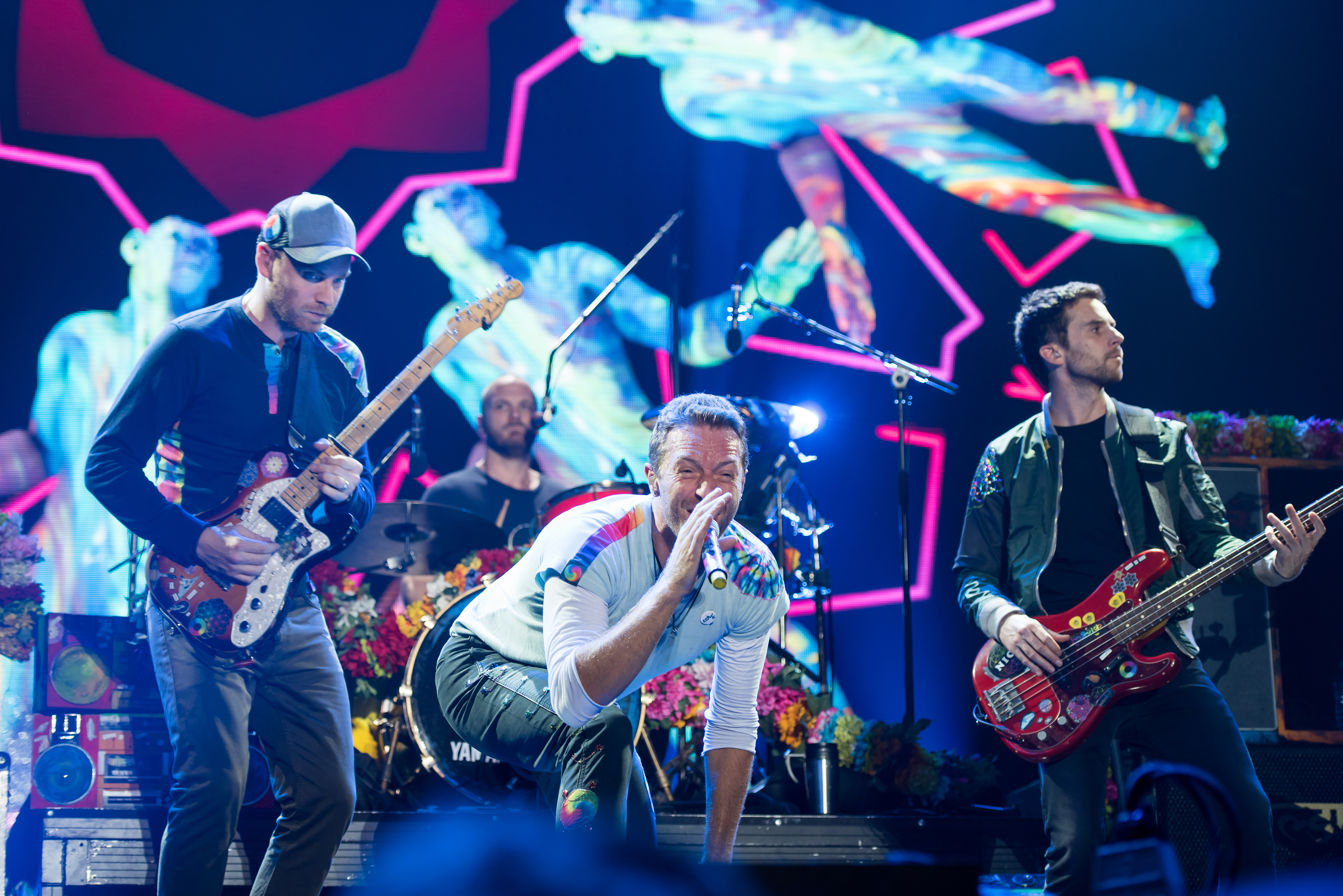 Coldplay beim Global Citizen Festival in Hamburg